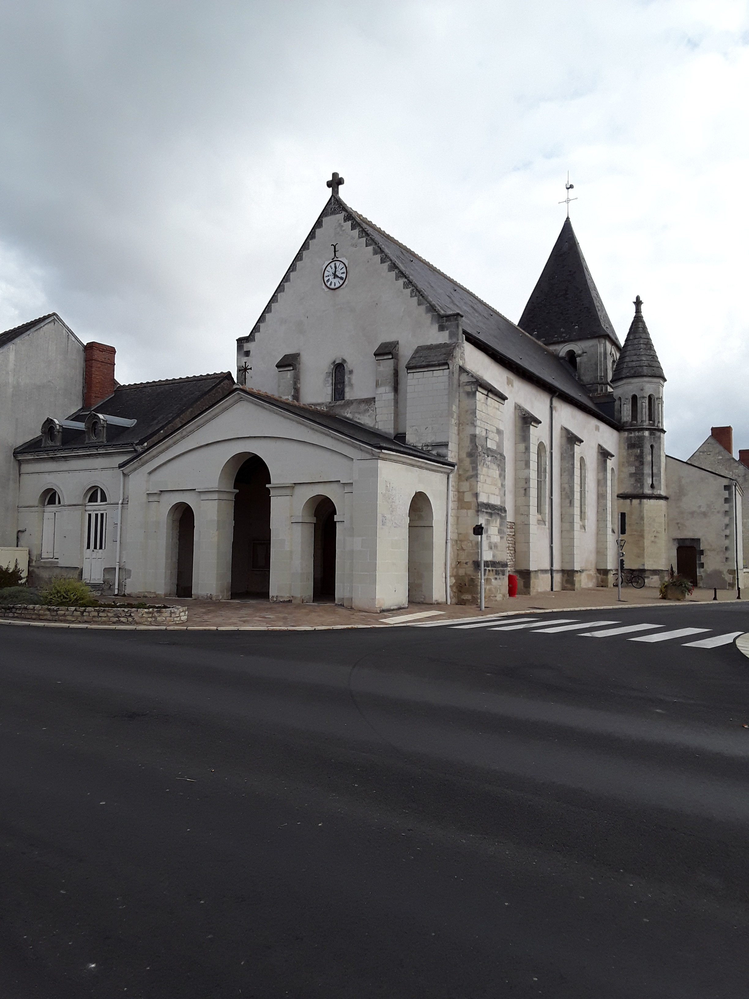 Église de la Celle-Saint-Avant, Indre-et-Loire, France